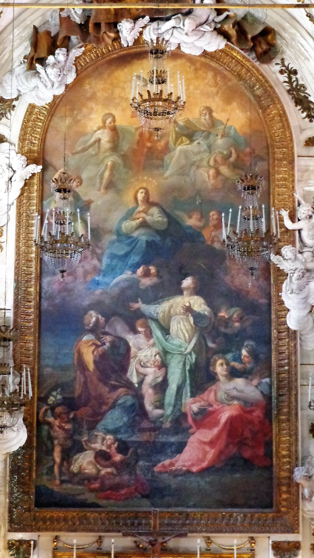 Dipinto.